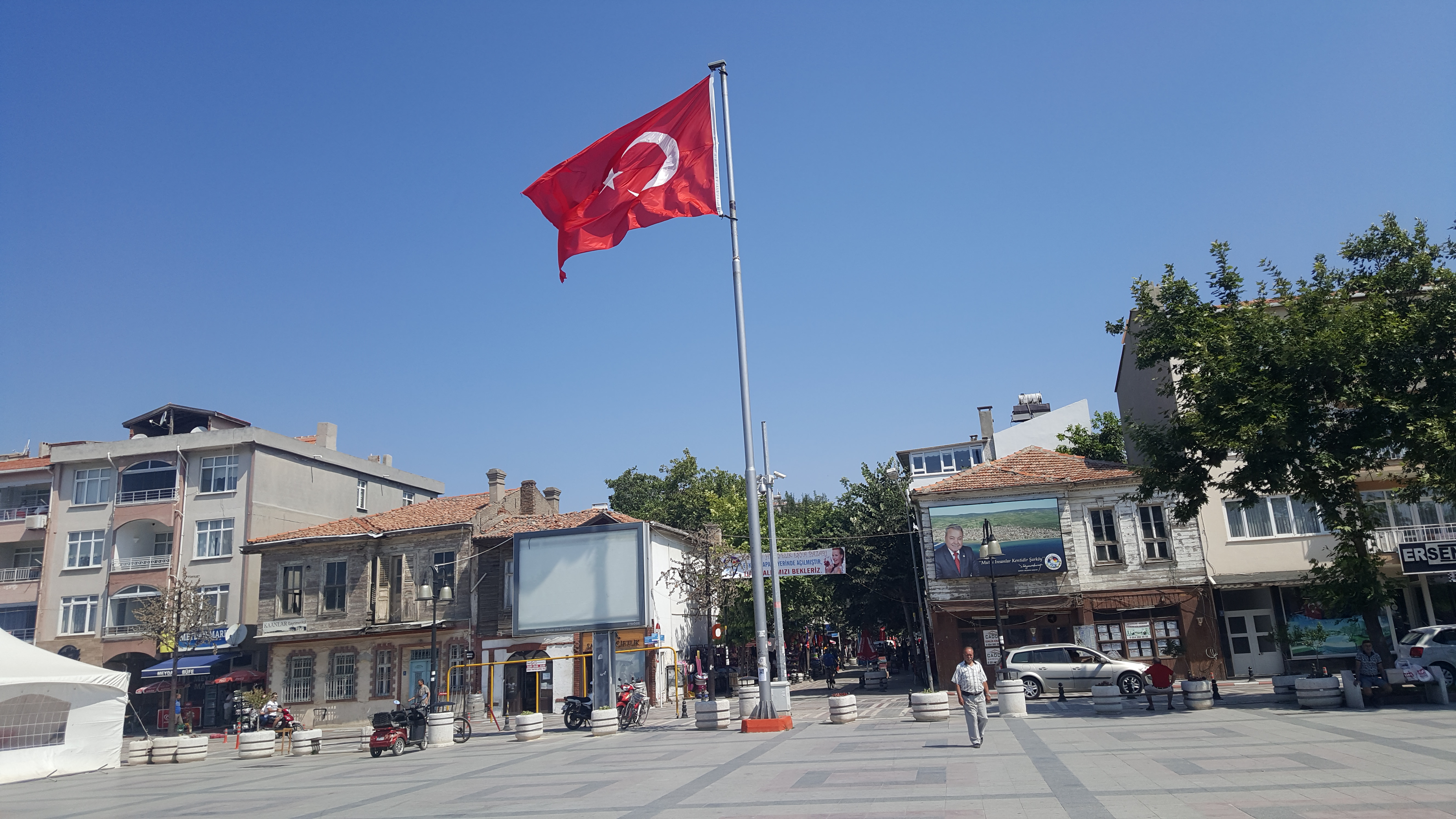 Şarköy Cumhuriyet Meydaı